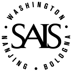 SAIS Logo